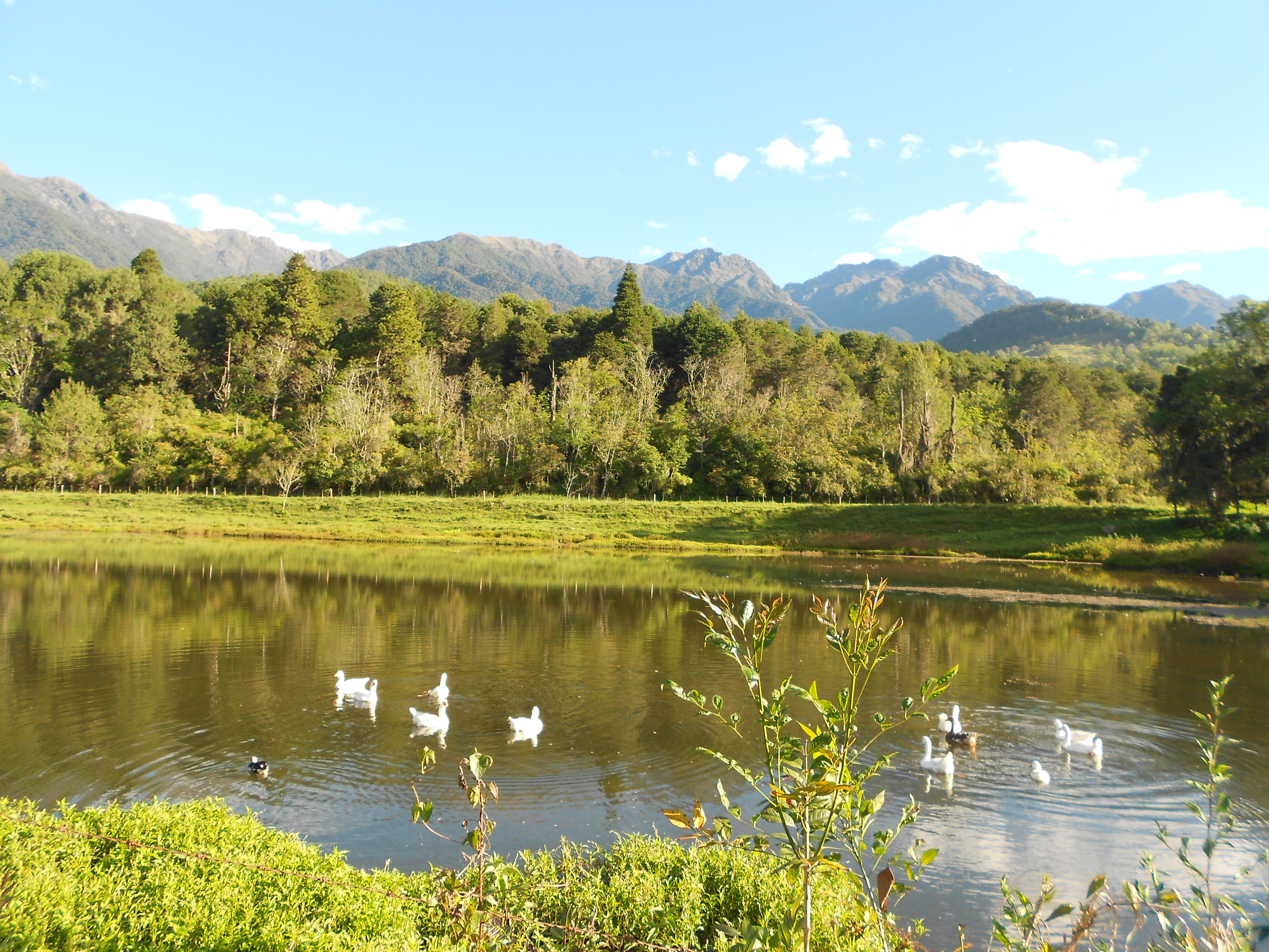 Distintas vistas del paisaje que se puede apreciar una simple mañana en El Valle, estado Mérida.